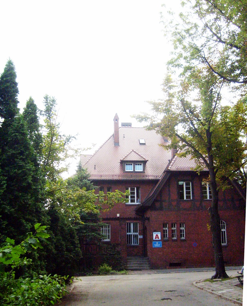 Poznań, Szpital im. H. Święcickiego; budynek A przy rondzie, administracyjny